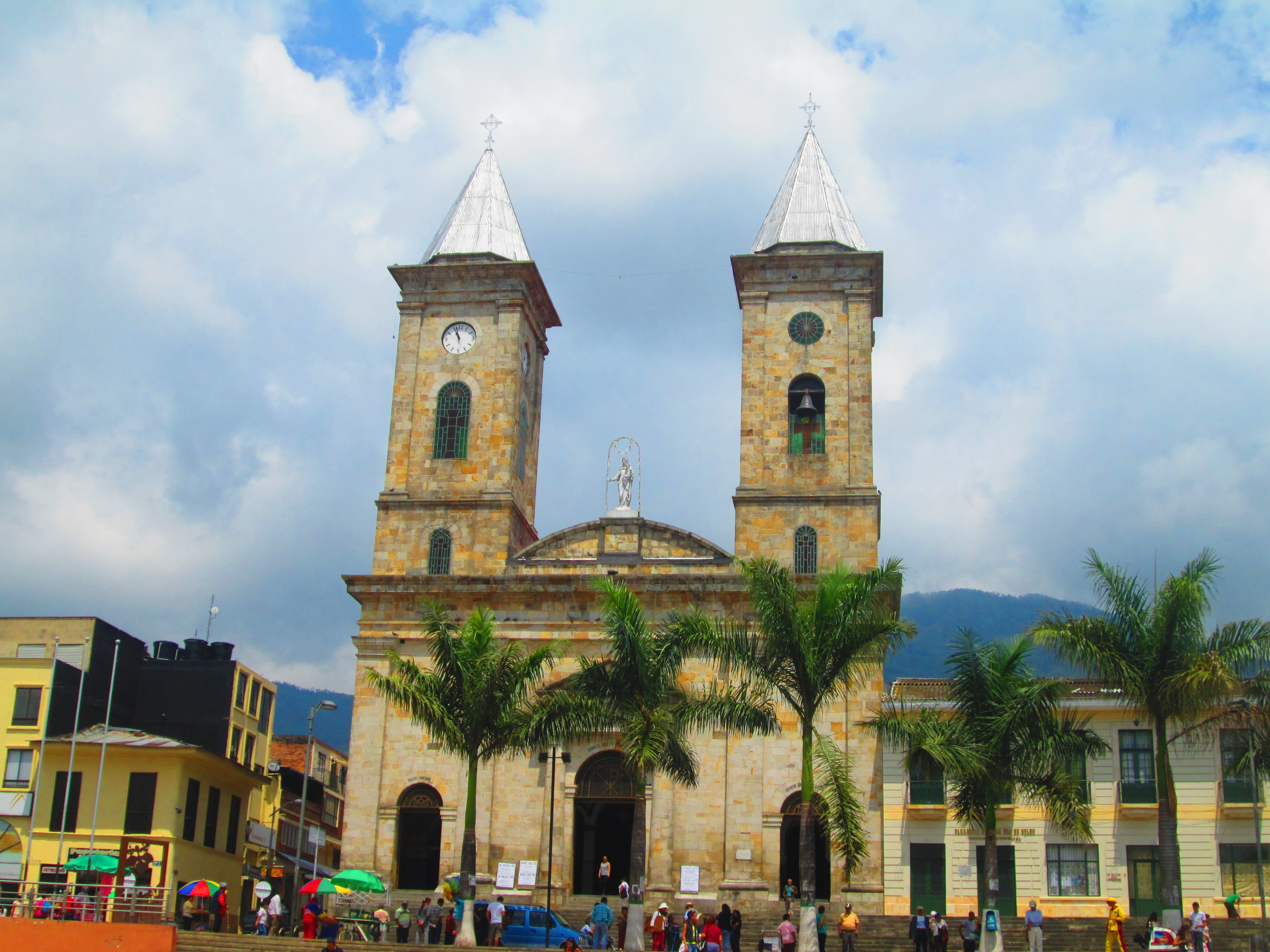 Esta fotografía fue tomada en el municipio colombiano con código 25290.